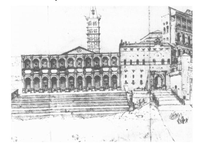 Reconstructietekenign van de Benedictijnse loggia van Pius II